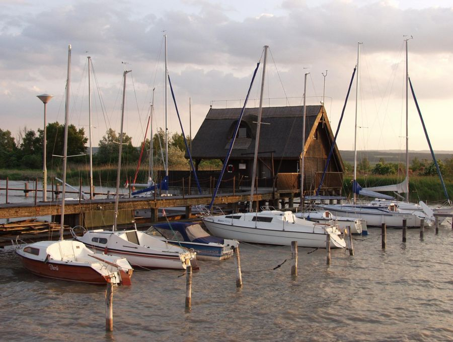 Jachtkikötő Fertőrákoson (Győr-Moson-Sopron megye)